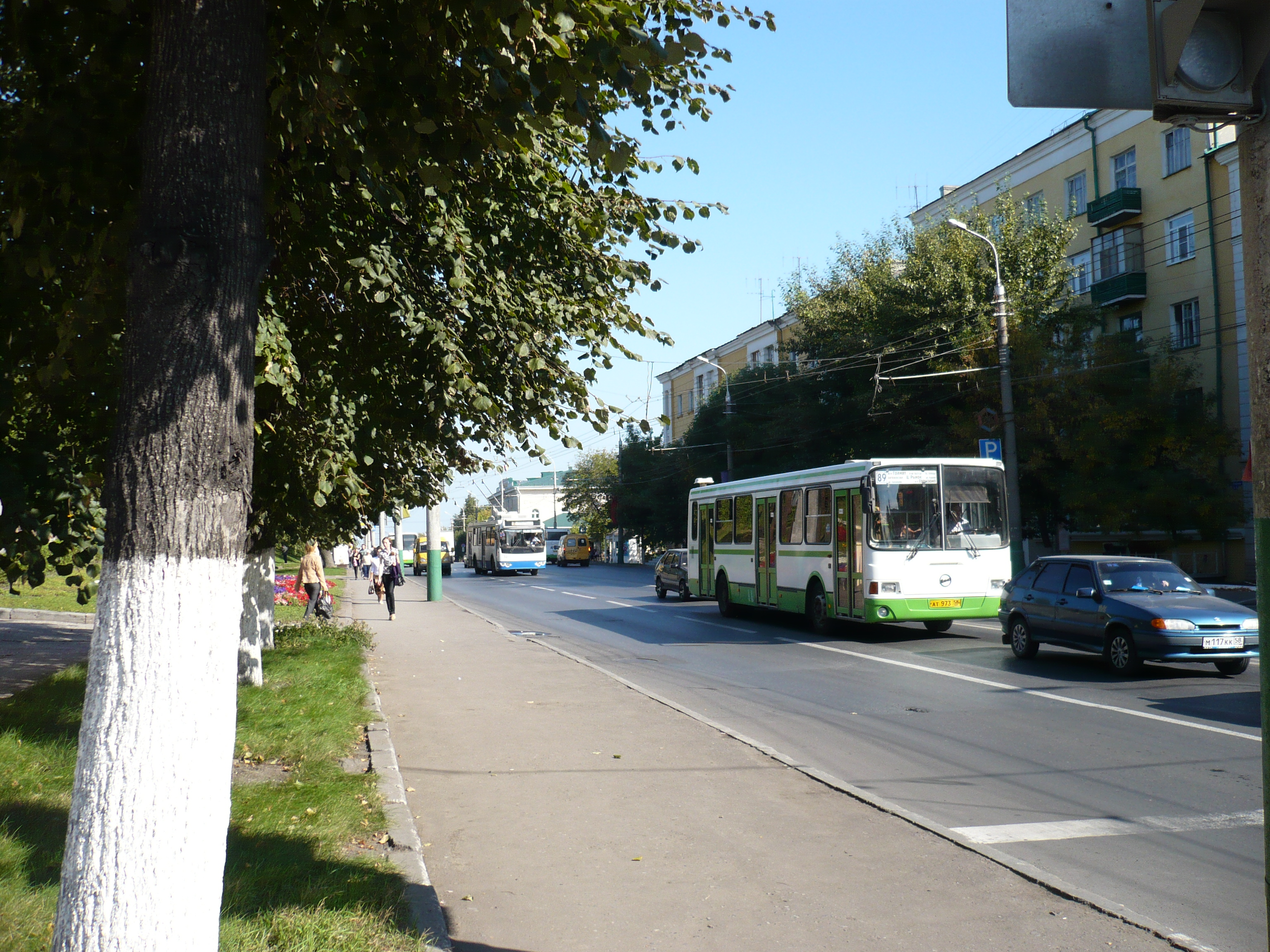 Улица Кирова г. Пензы рядом с Библиотекой им. Лермонтова